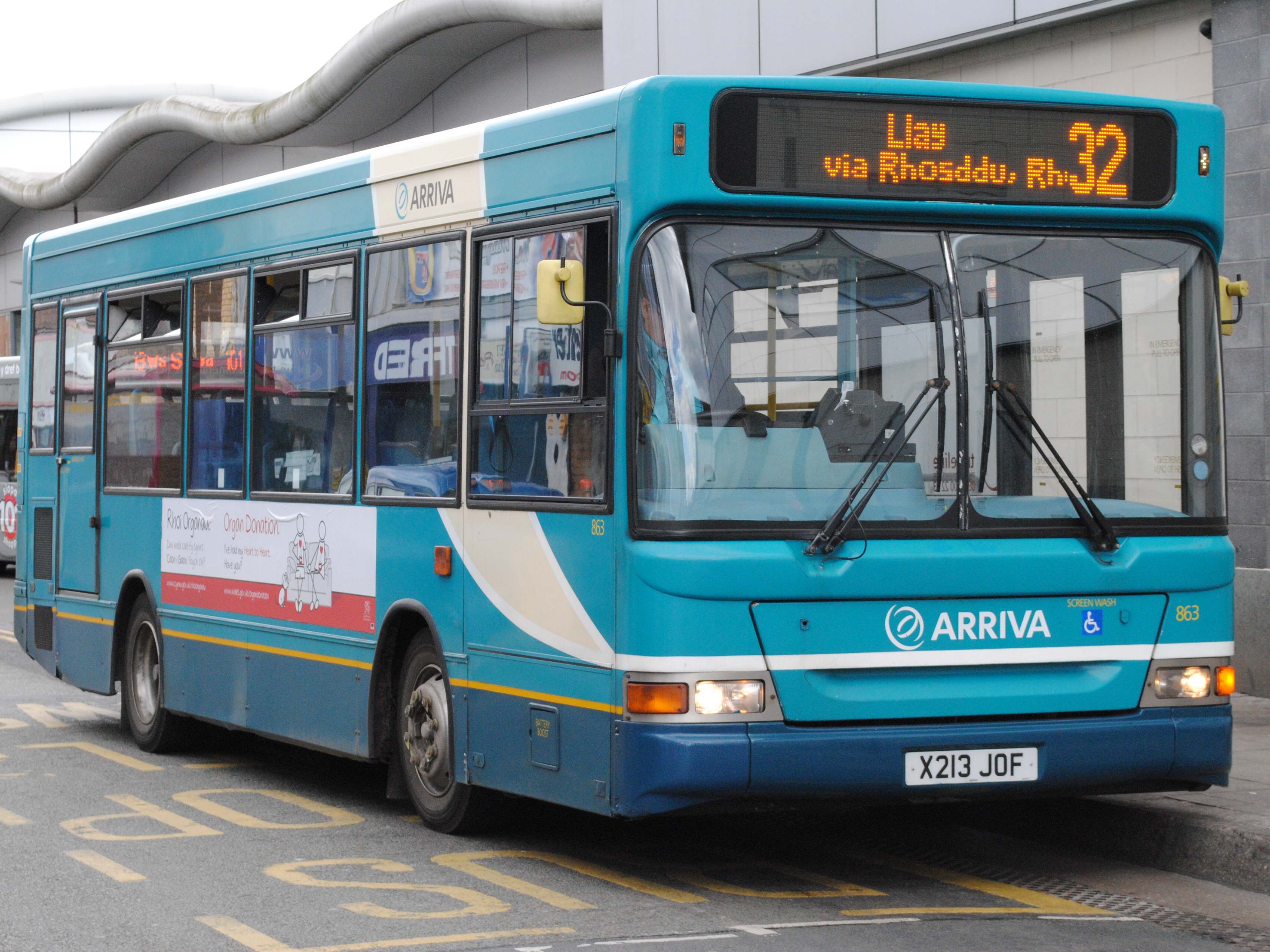 Dennis Dart SLF 8.8m Plaxton Pointer 2